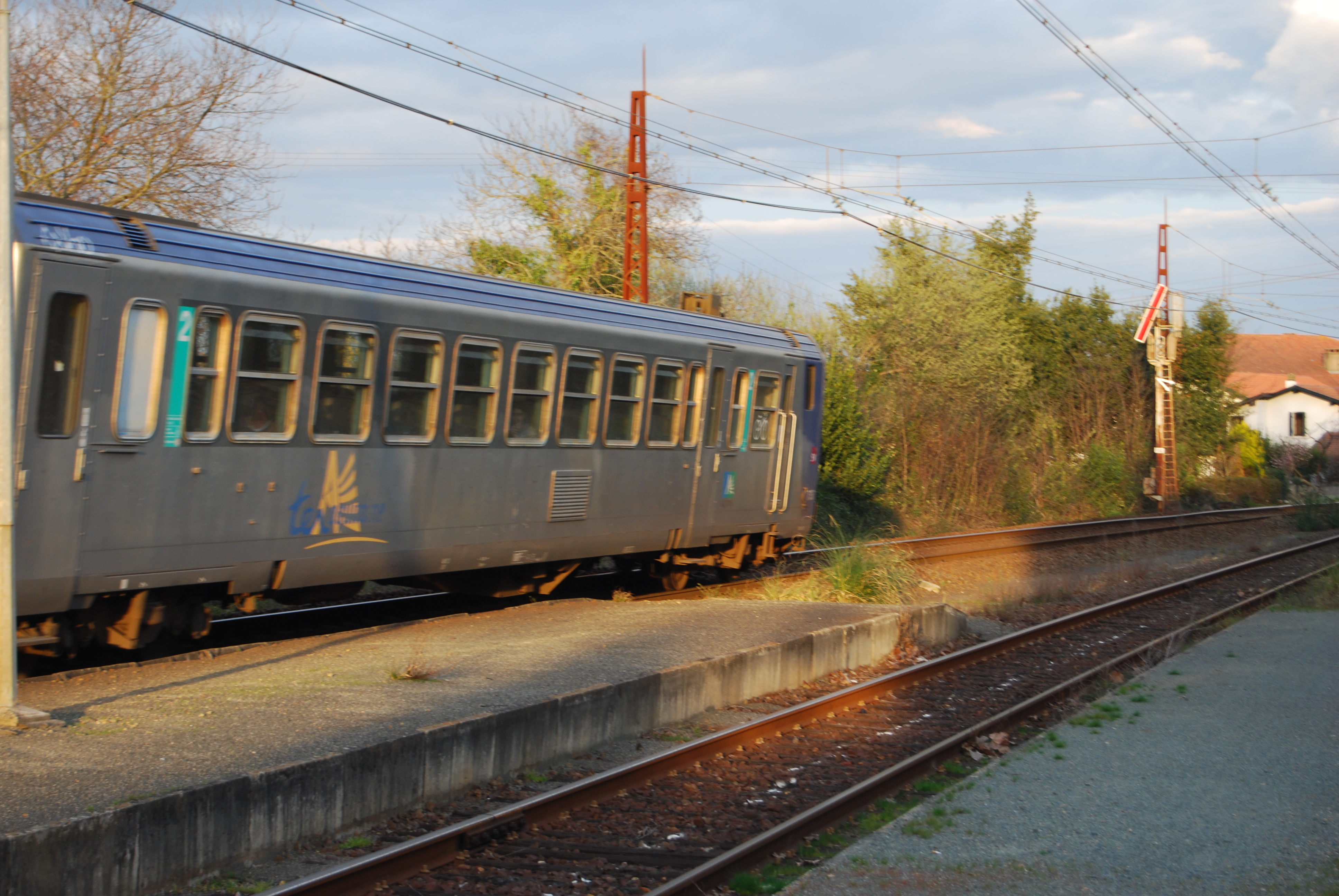 Un TER Aquitaine Bayonne - Pau quittant la gare d'Urt.